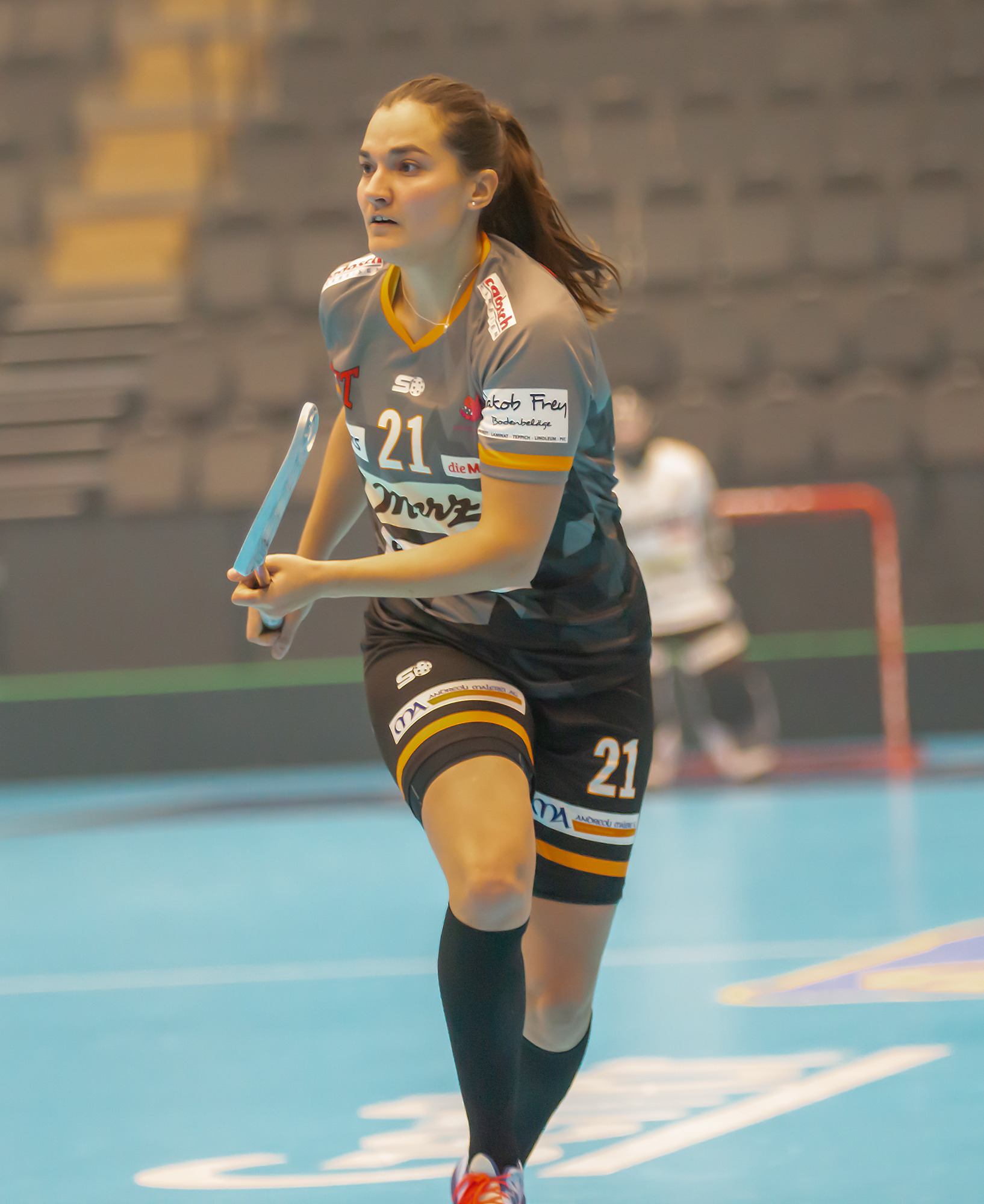 IFF FCC 2019 IKSU-PIRANHA CHUR